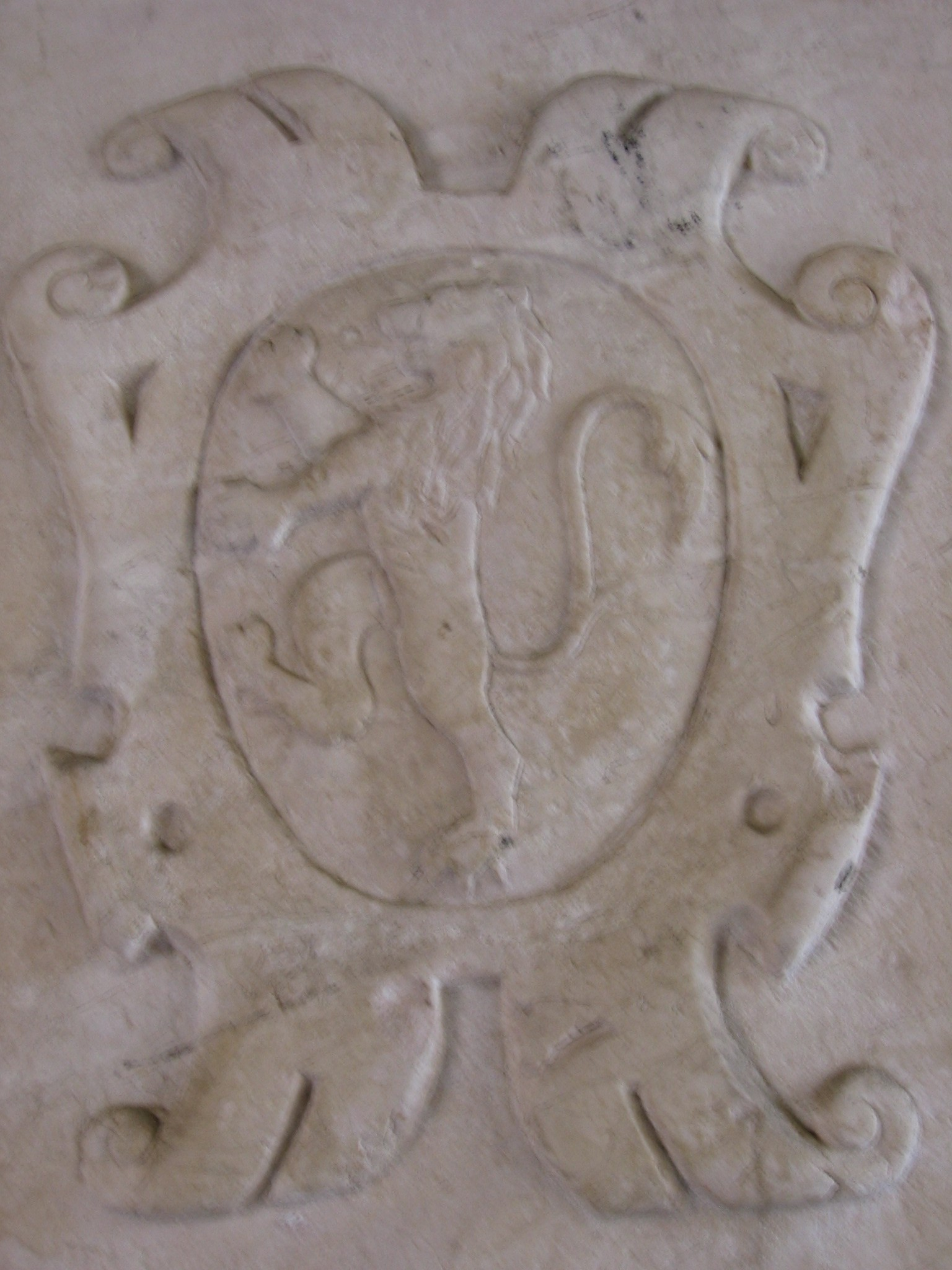 Stemma conti Calepio, Castelli Calepio, Bergamo, Italia